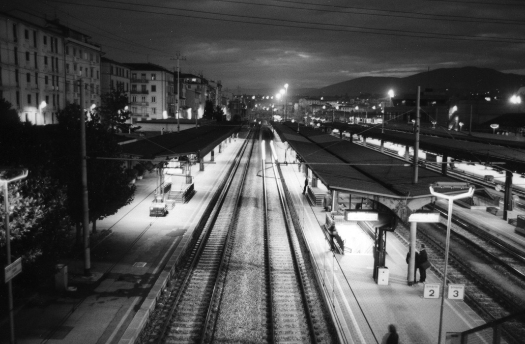 Bahnhof Campo Marte in Florenz